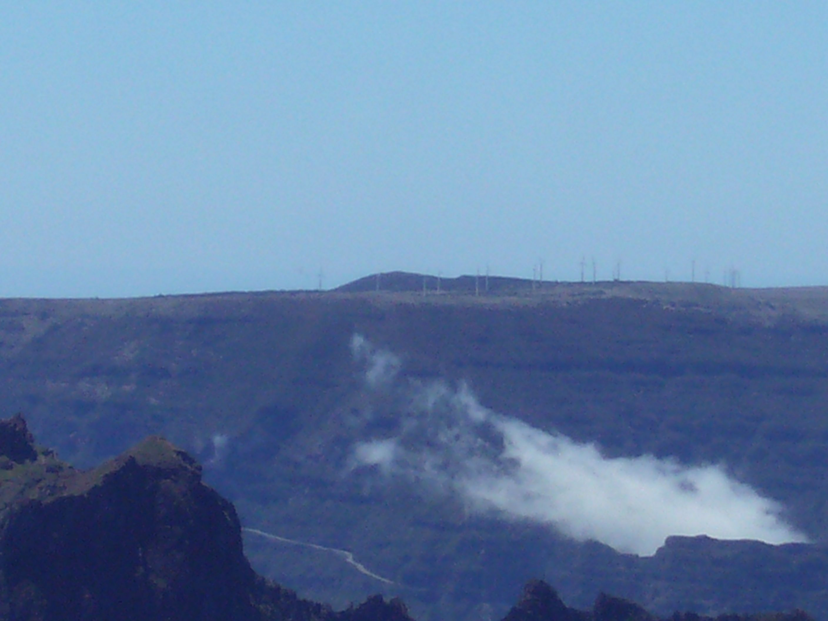 Power stations at Paúl da Serra as seen from Pico do Arieiro - Madeira